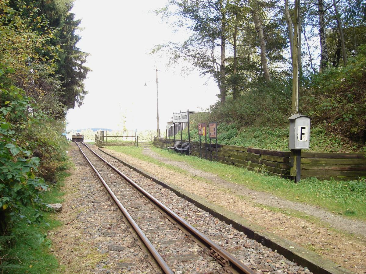 Haltepunkt Stützengrün-Neulehn der Schmalspurbahn Wilkau-Haßlau–Carlsfeld